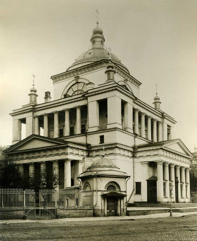 Здание Никольской единоверческой церкви в Санкт-Петербурге